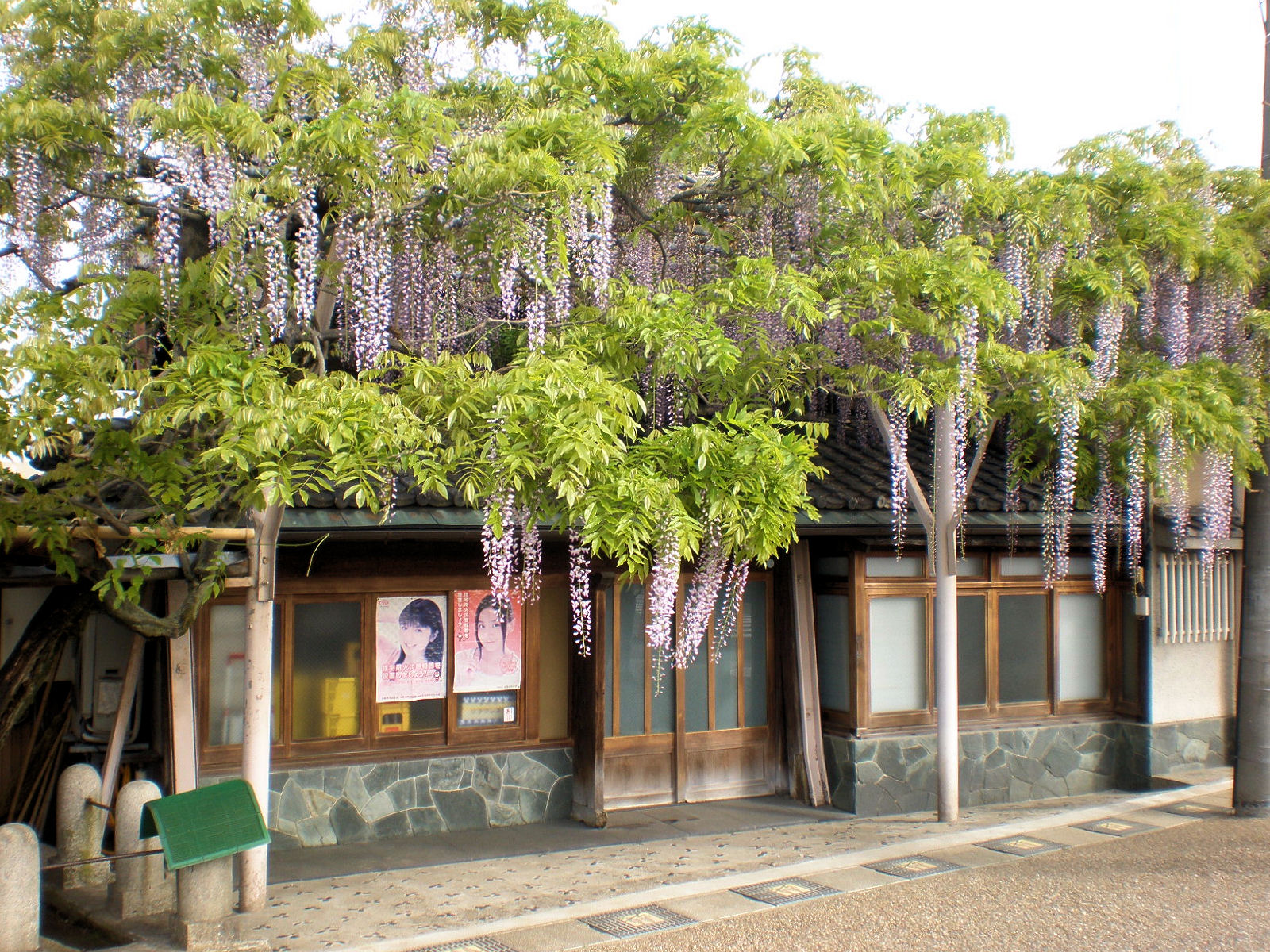 愛知県小牧市にある料亭「清流亭」